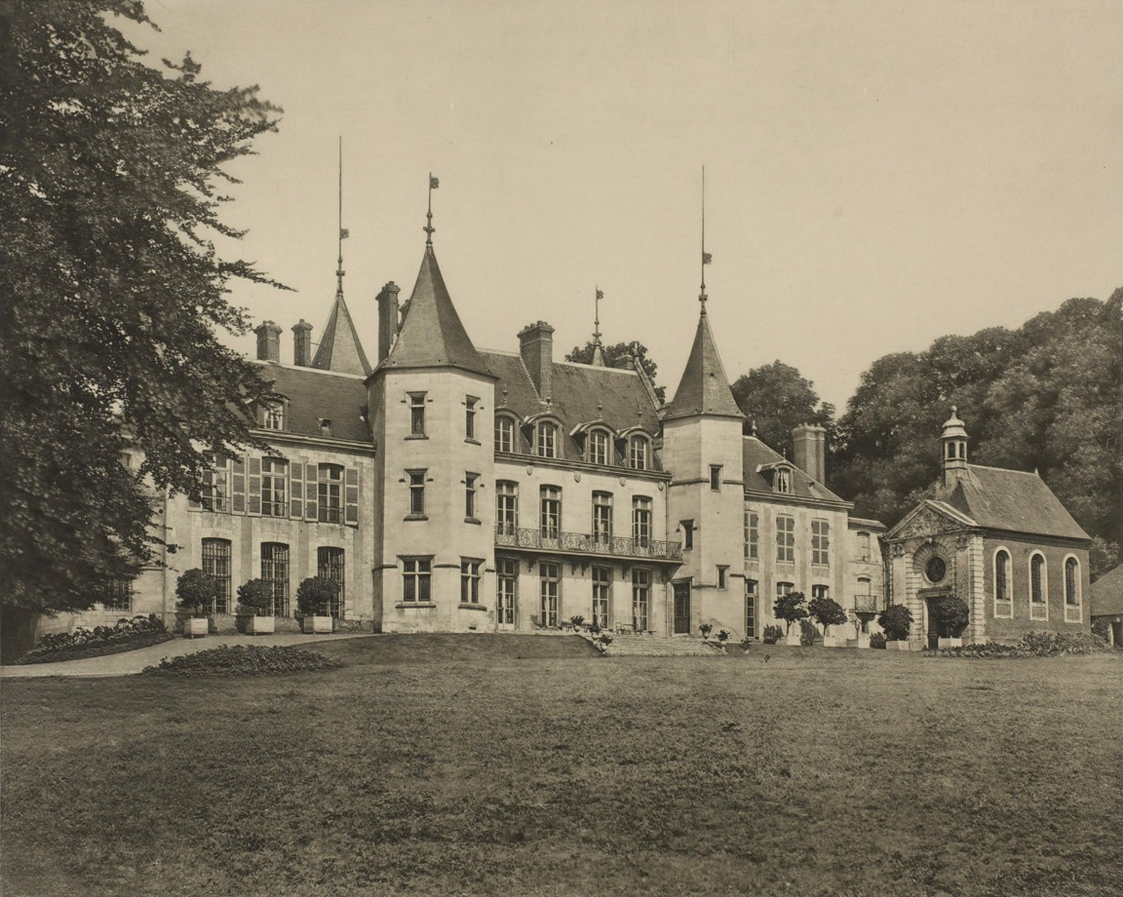 Alte Fotografie des Schlosses Esneval in Pavilly